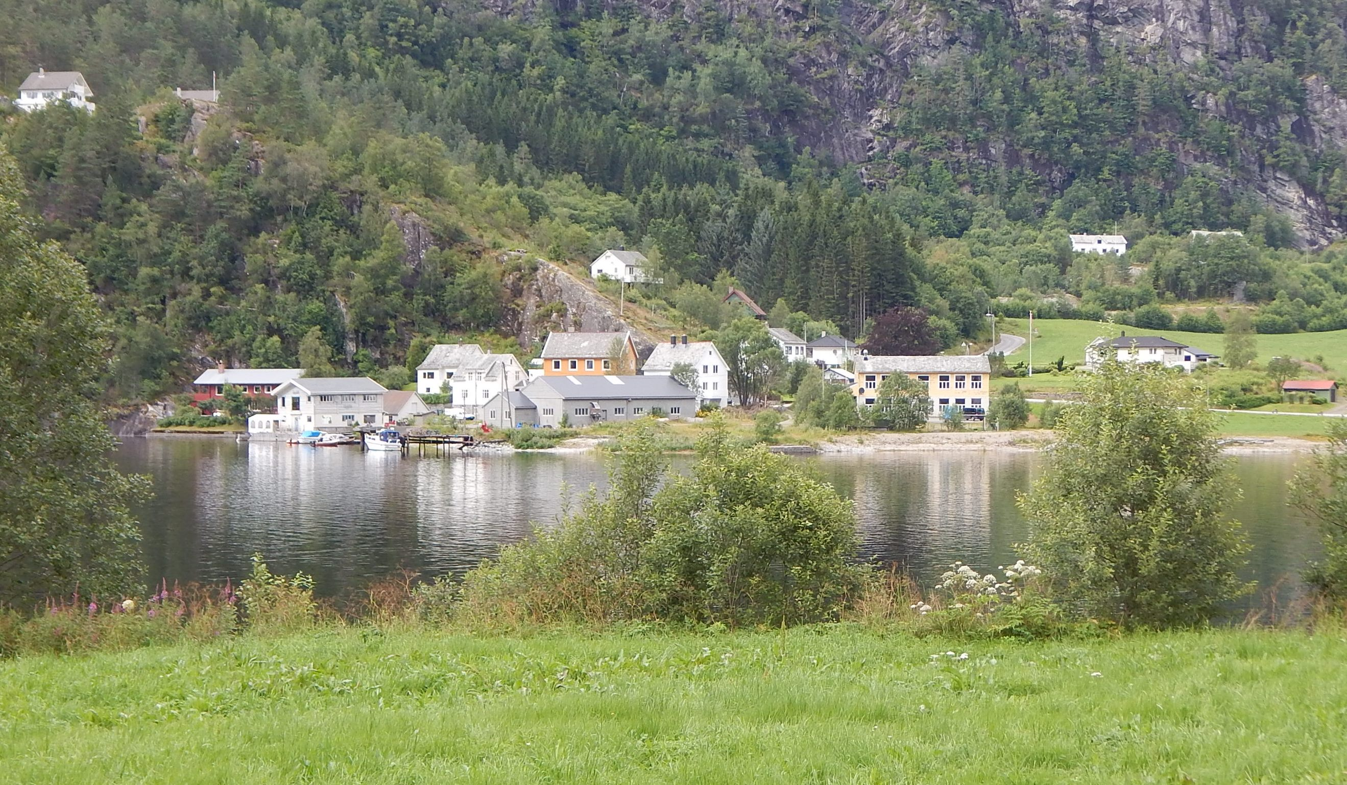 Eidslandet sett fra Eidsland kapell